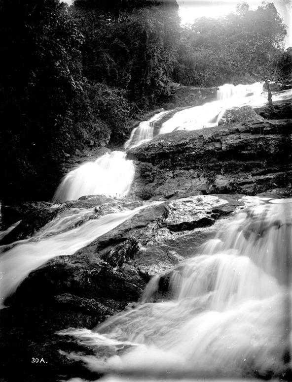 Wasserfälle des Sigi bei Amani